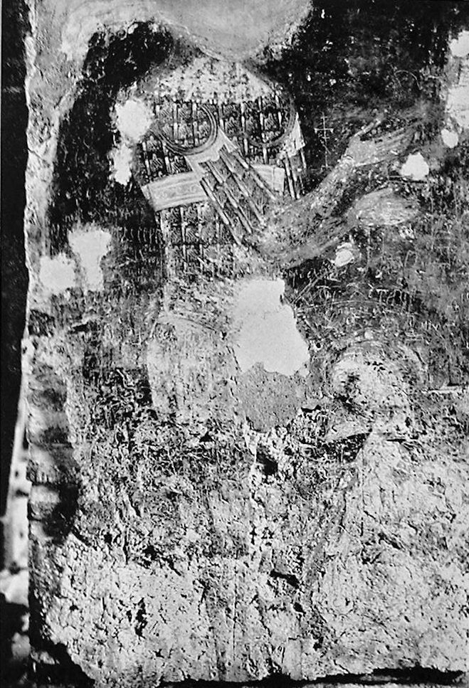 Basarab I after a contemporary fresco from Biserica Domnească, Argeş